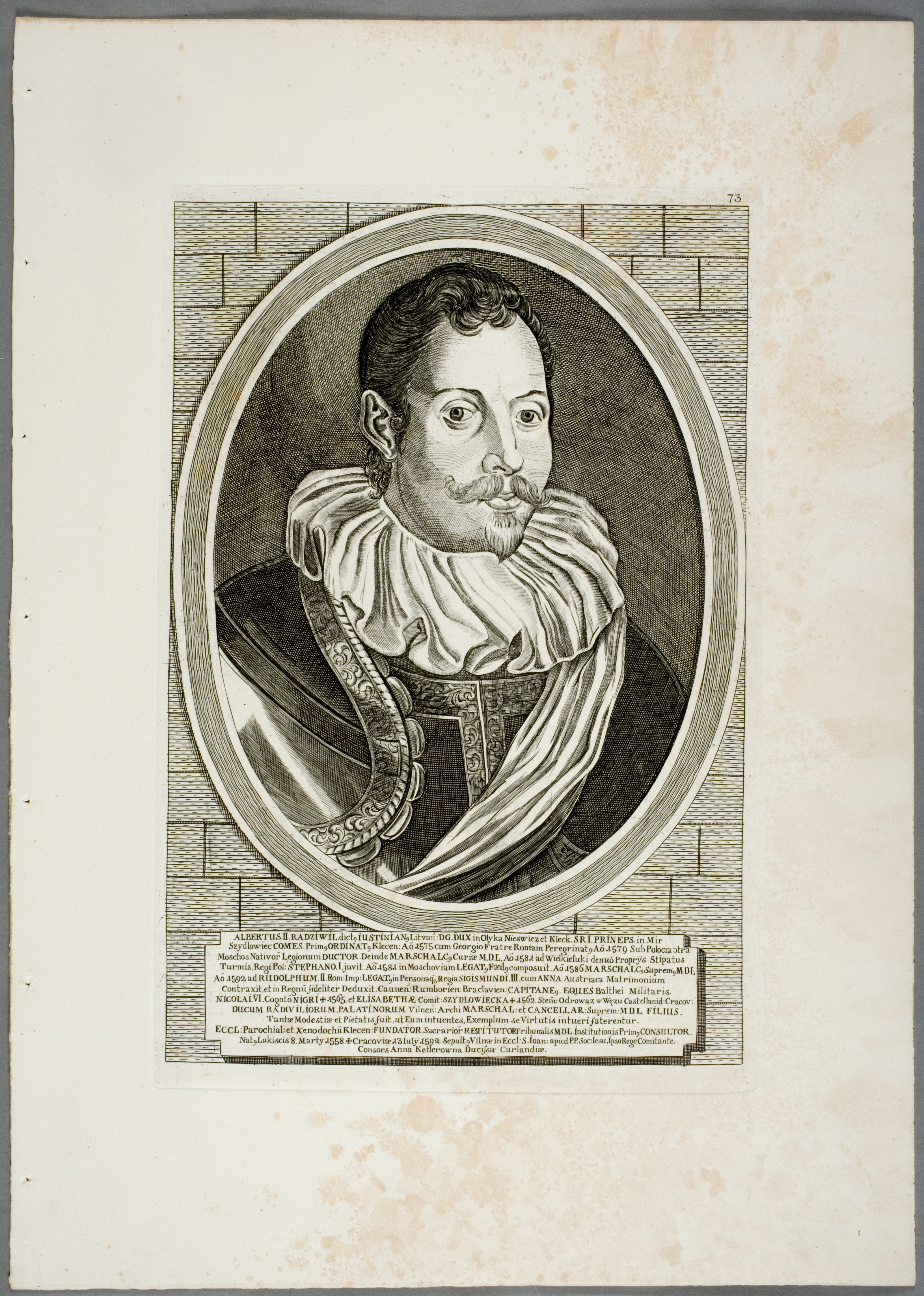 Беларуская (тарашкевіца): Партрэт Альбрэхта Радзівіла «Юстыніяна» (Albrecht Radzivił «Justynijan»)